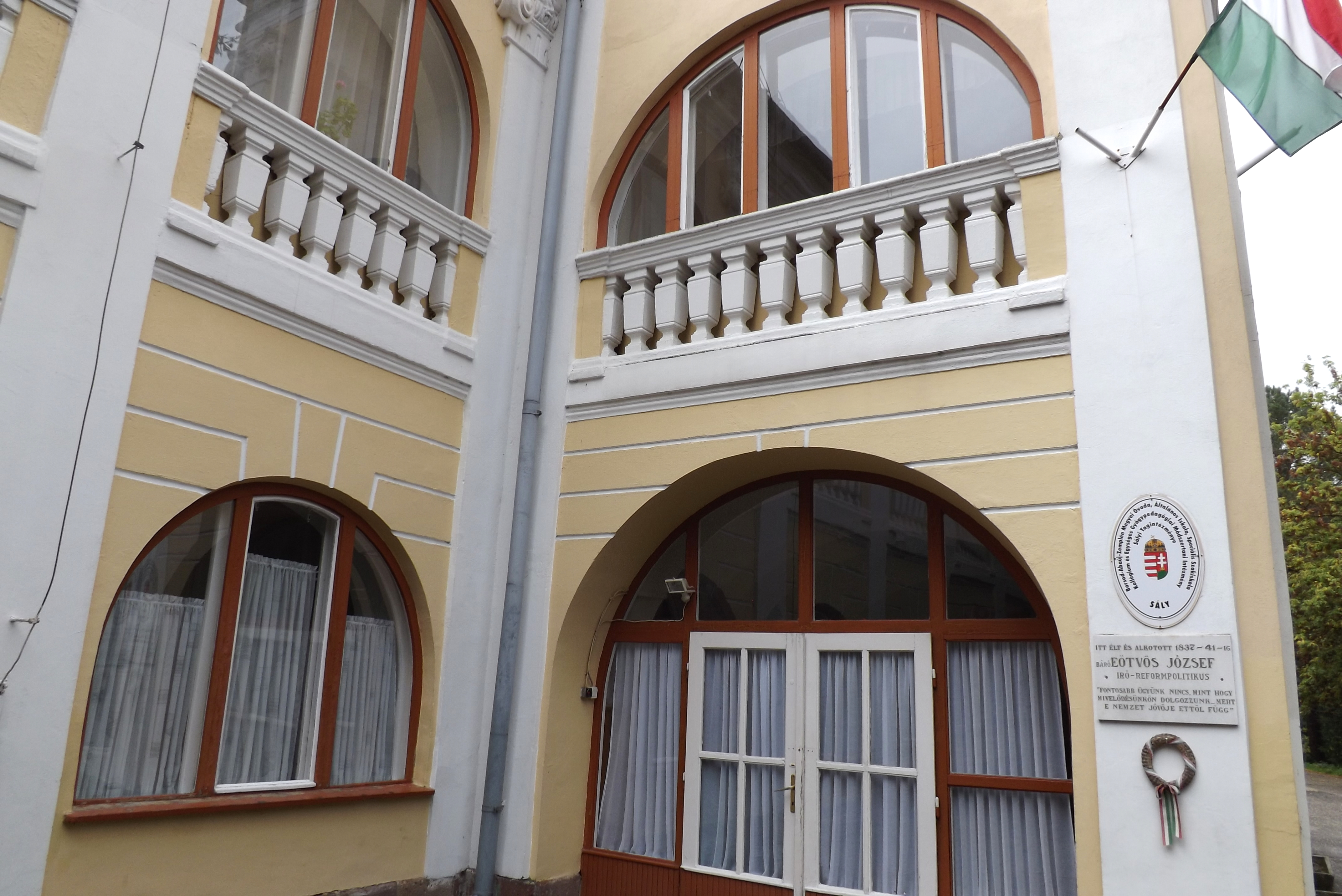 Sály, Eötvös-kastély, Eötvös József emléktáblája a kastély falán